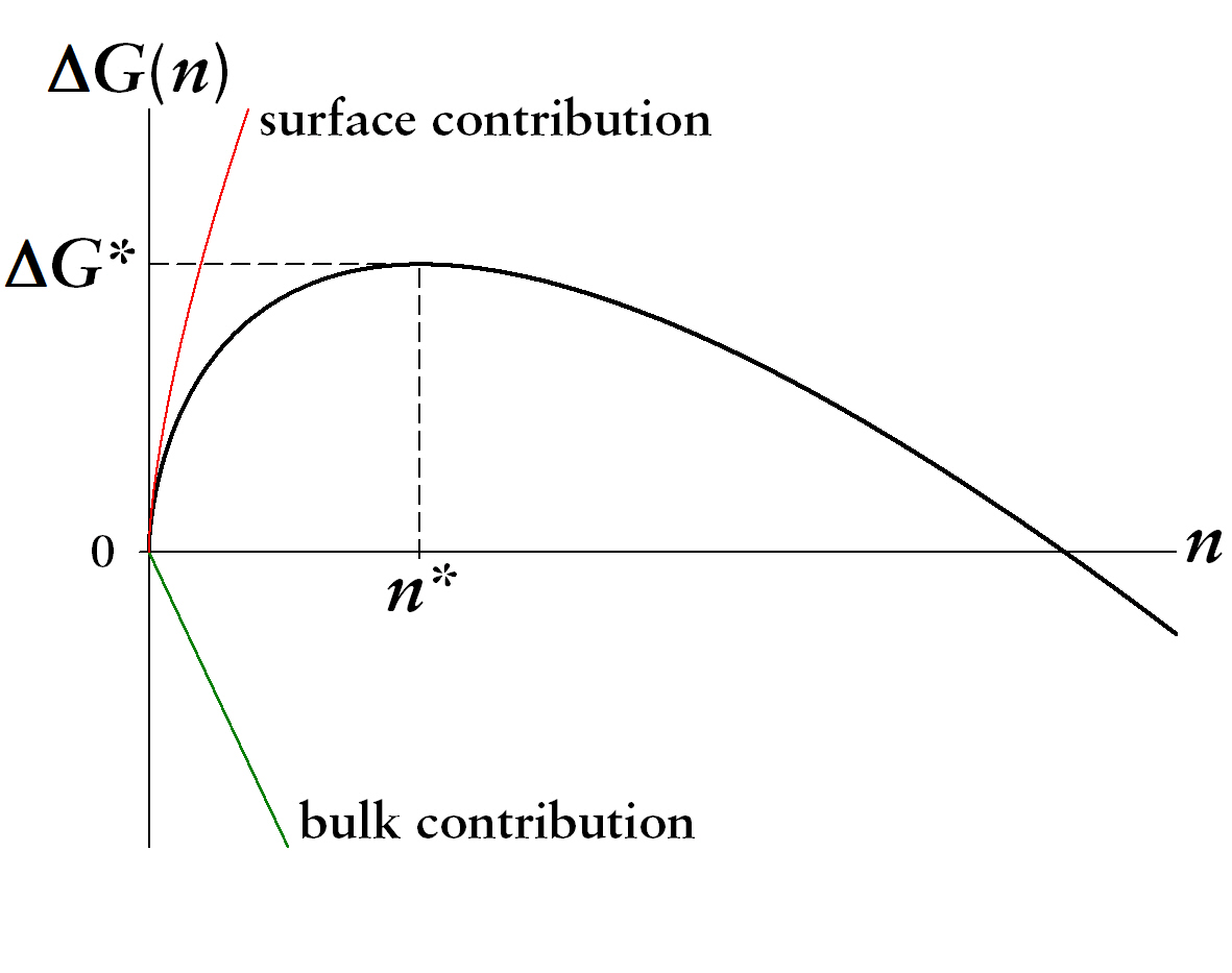 Typische Barriere in der klassischen Keimbildungstheorie